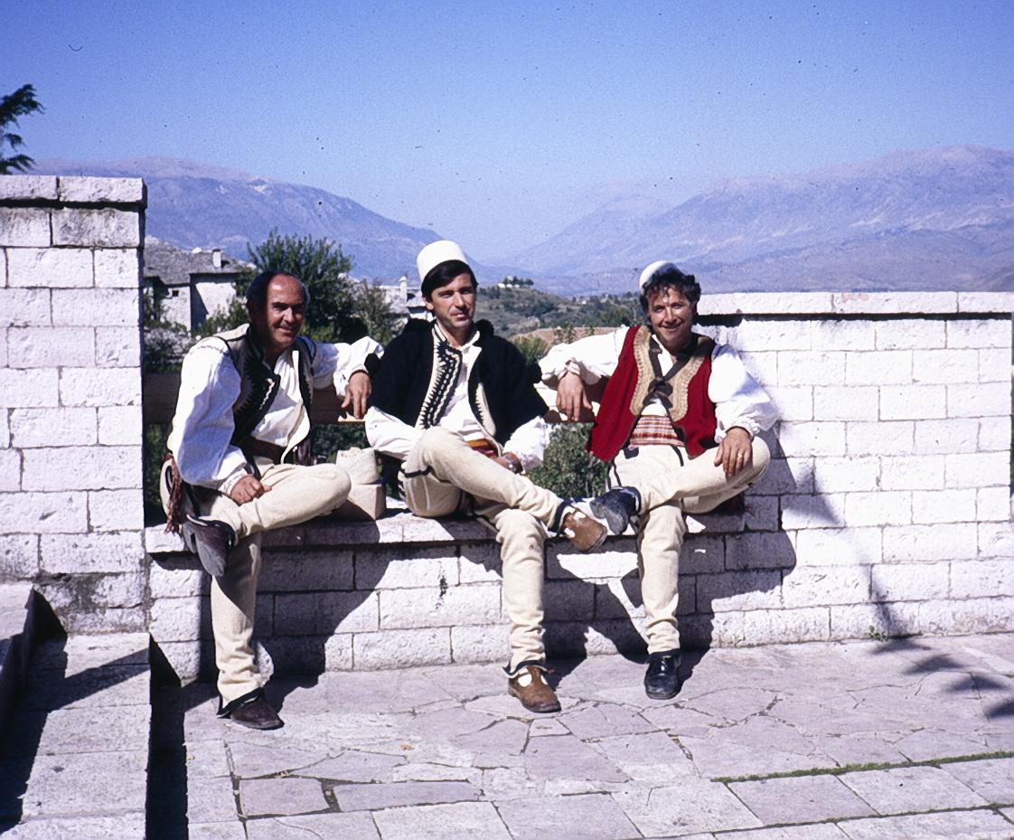 Folk singers in Gjirokastër, Albania, October 1988